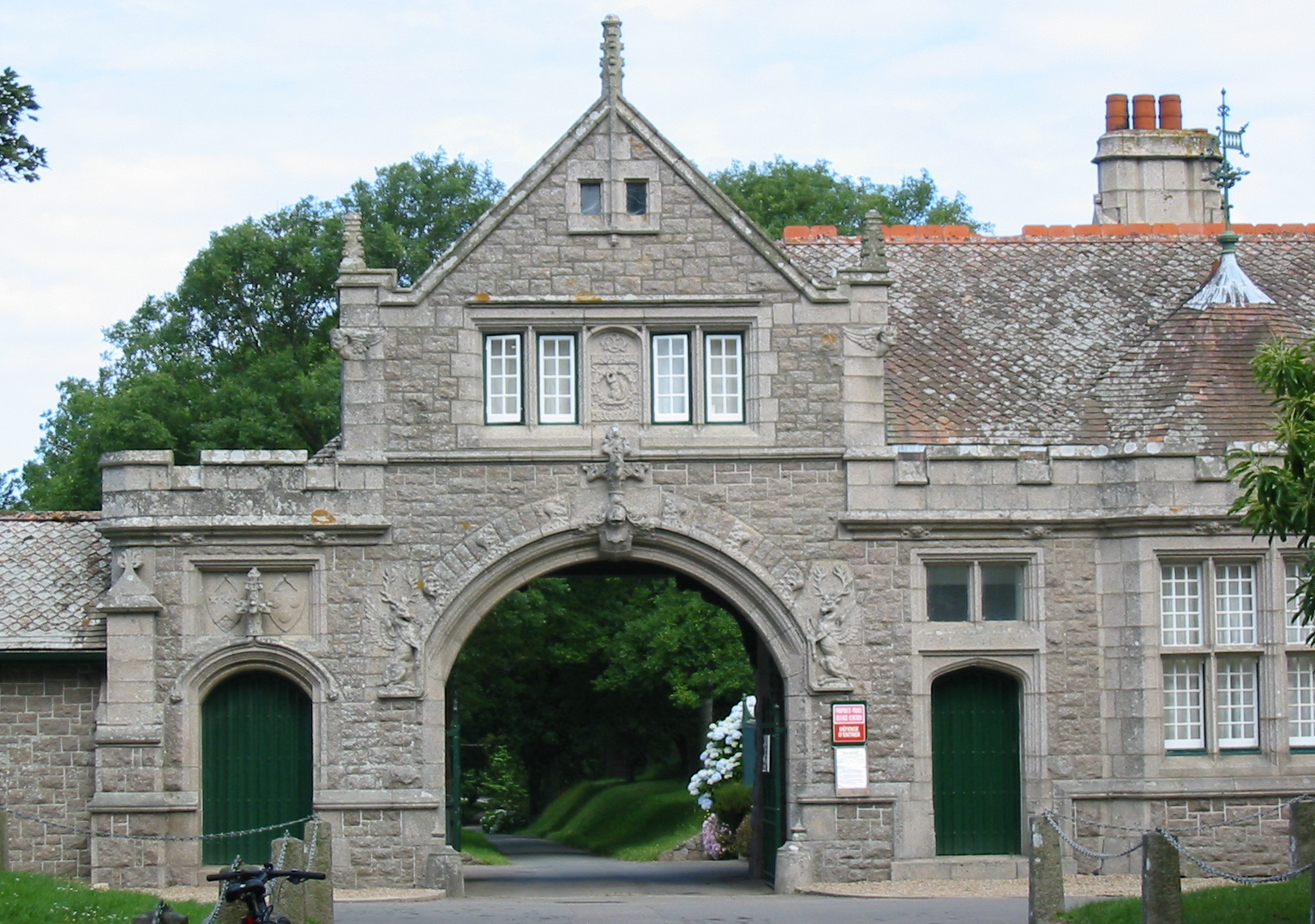 Nrf: Saint Ouën, Jèrri, 5 d'Juilet 2009